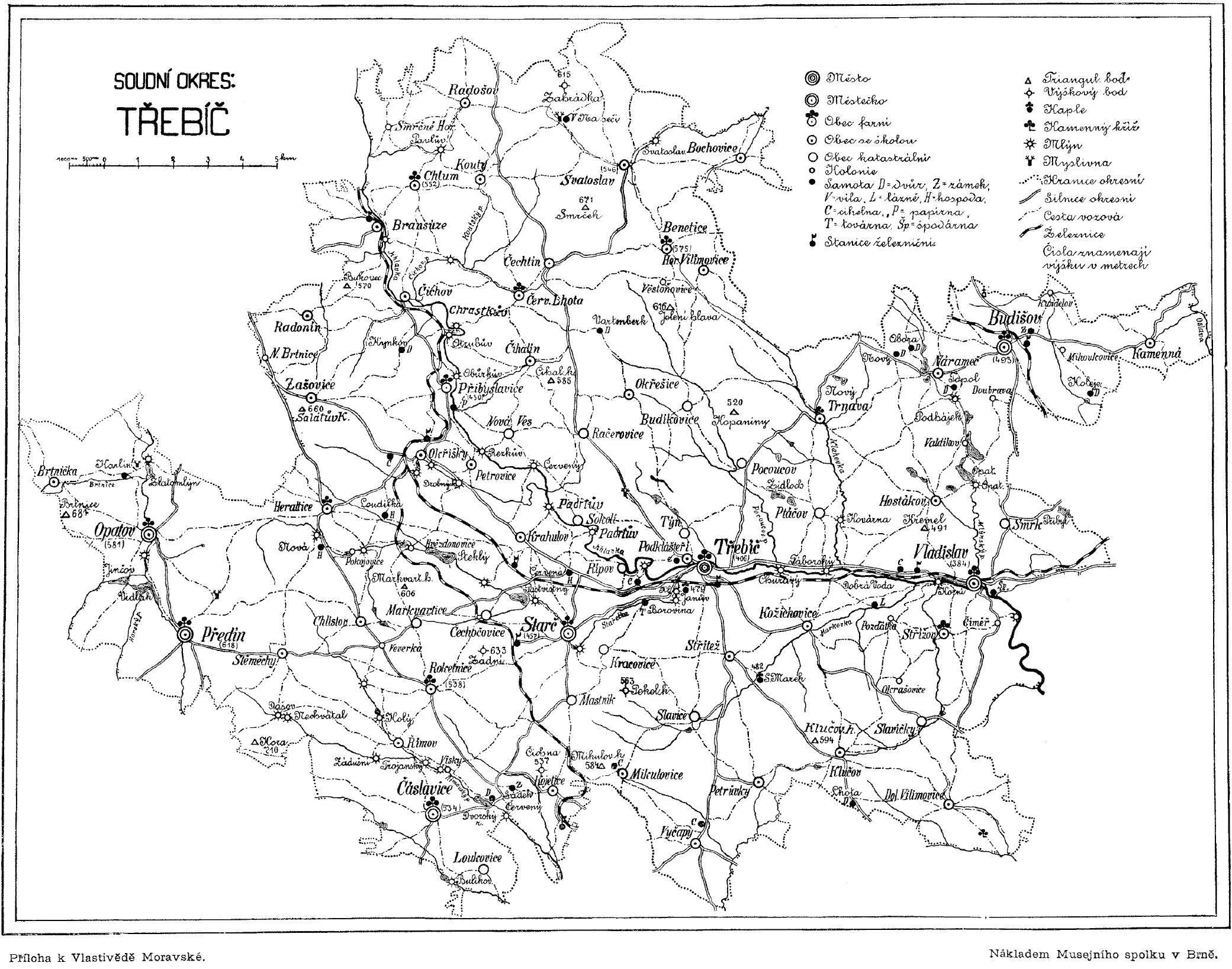 Plánek bývalého soudního okresu Třebíč